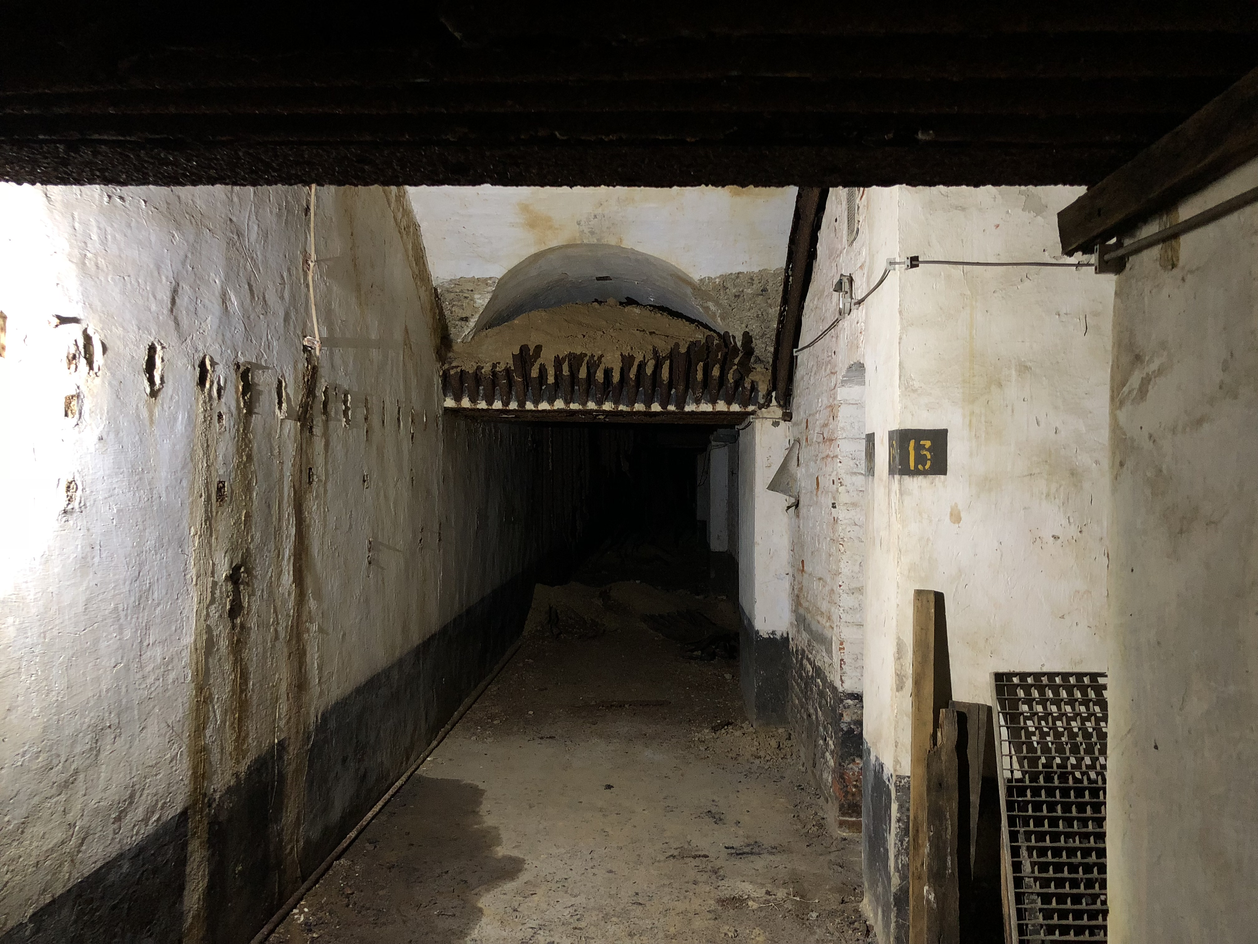 Fort d'Emines lors du centenaire de l'armistice le 11 novembre 2018